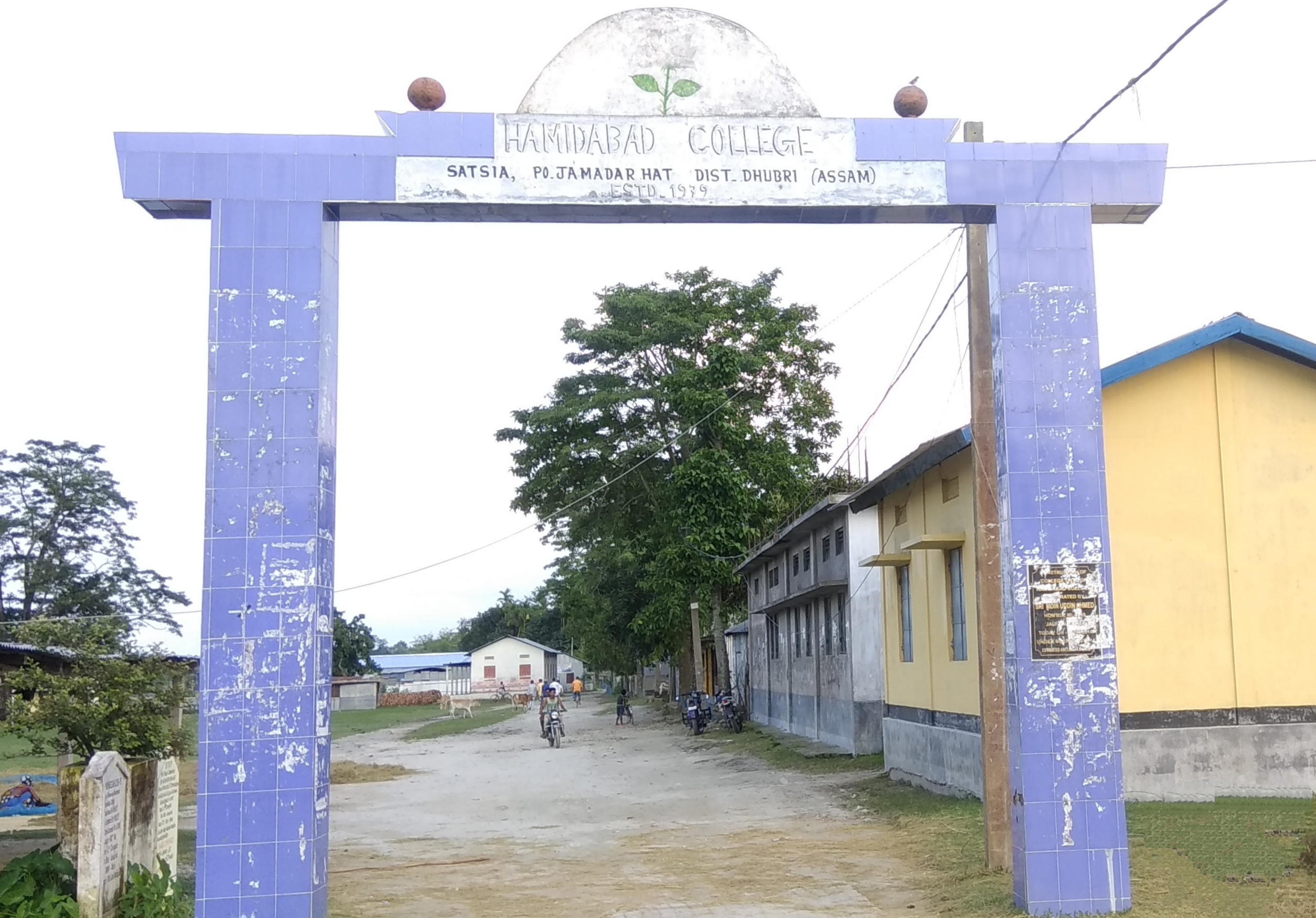 অসমীয়া: এই ছবিখন হামিদাবাদ মহাবিদ্যালয়ৰ প্ৰৱেশপথৰ সমুখৰ পৰা মোবাইল কেমেৰাৰে সংৰক্ষণ কৰা হৈছে।